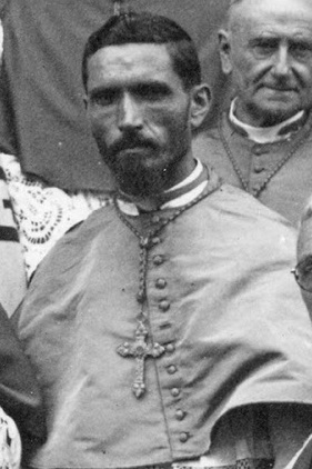 Mgr Jean Baptiste Fauret, Vicaire apostolique de Loango lors du sacre de Mgr Marcel Lefebvre à Tourcoing